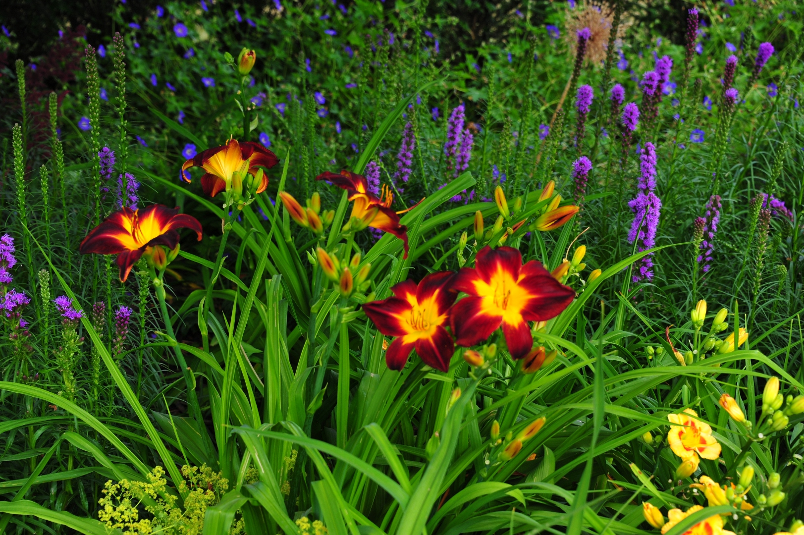 Taglilien